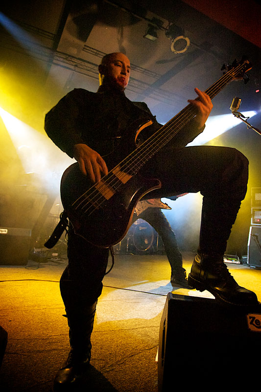 Vesania, Wrocław, Firlej, 13.05.2011